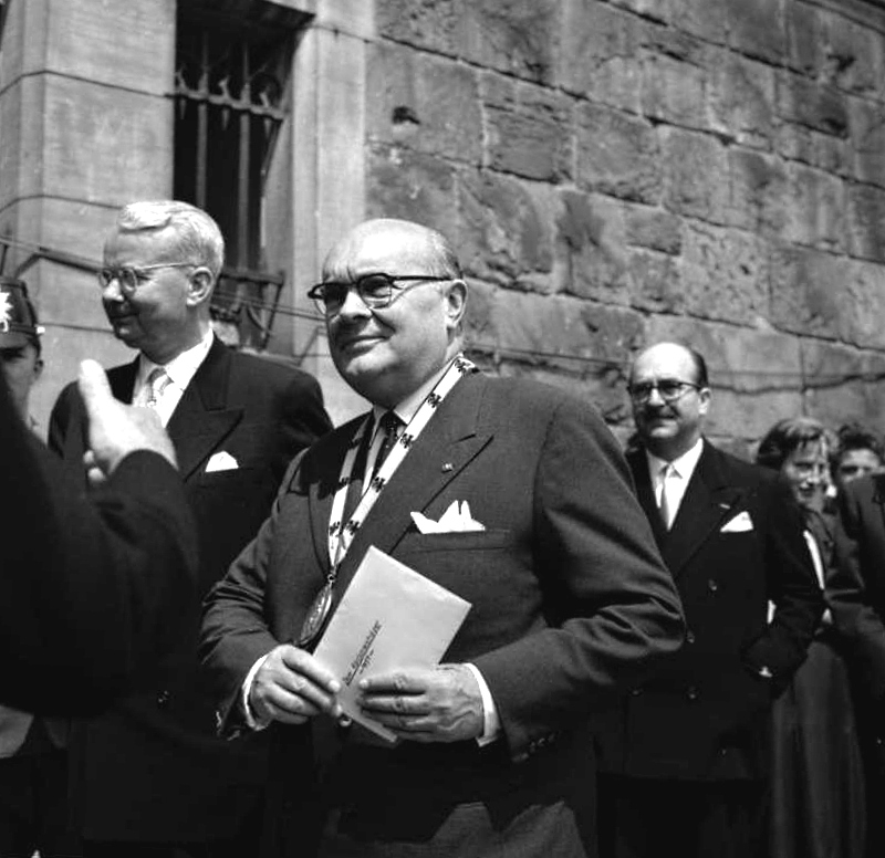 Verleihung des Karlspreises der Stadt Aachen an Paul Henri Spaak im Krönungssaal des Rathauses